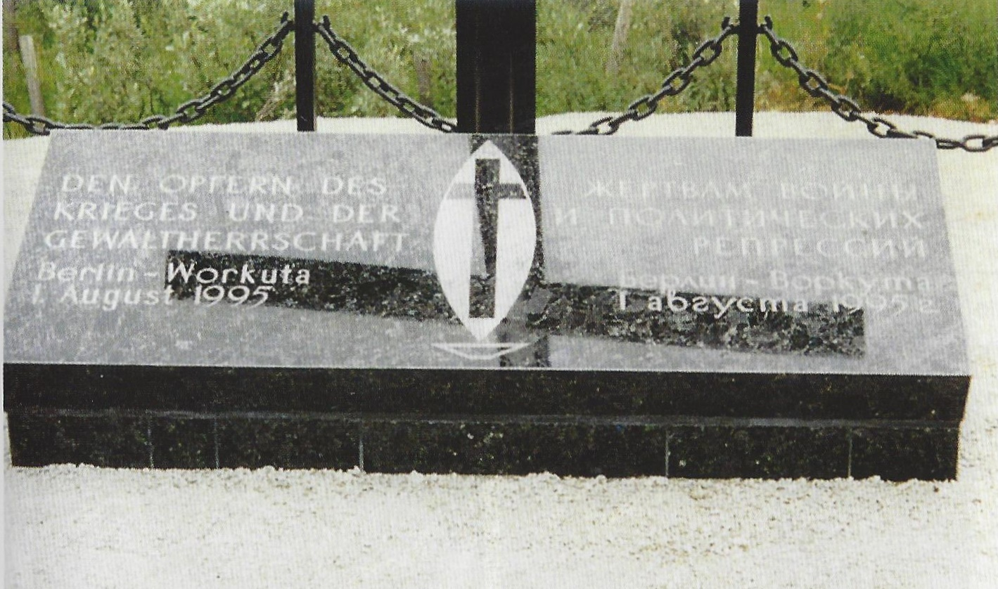 Gedenkplatte für die deutschen Häftlinge im Arbeitslager Workuta